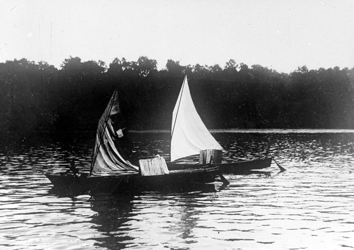 Repronegatief. Woonschuiten van de Orang-Laoets langs de kusten van Djambi en Riouw varende